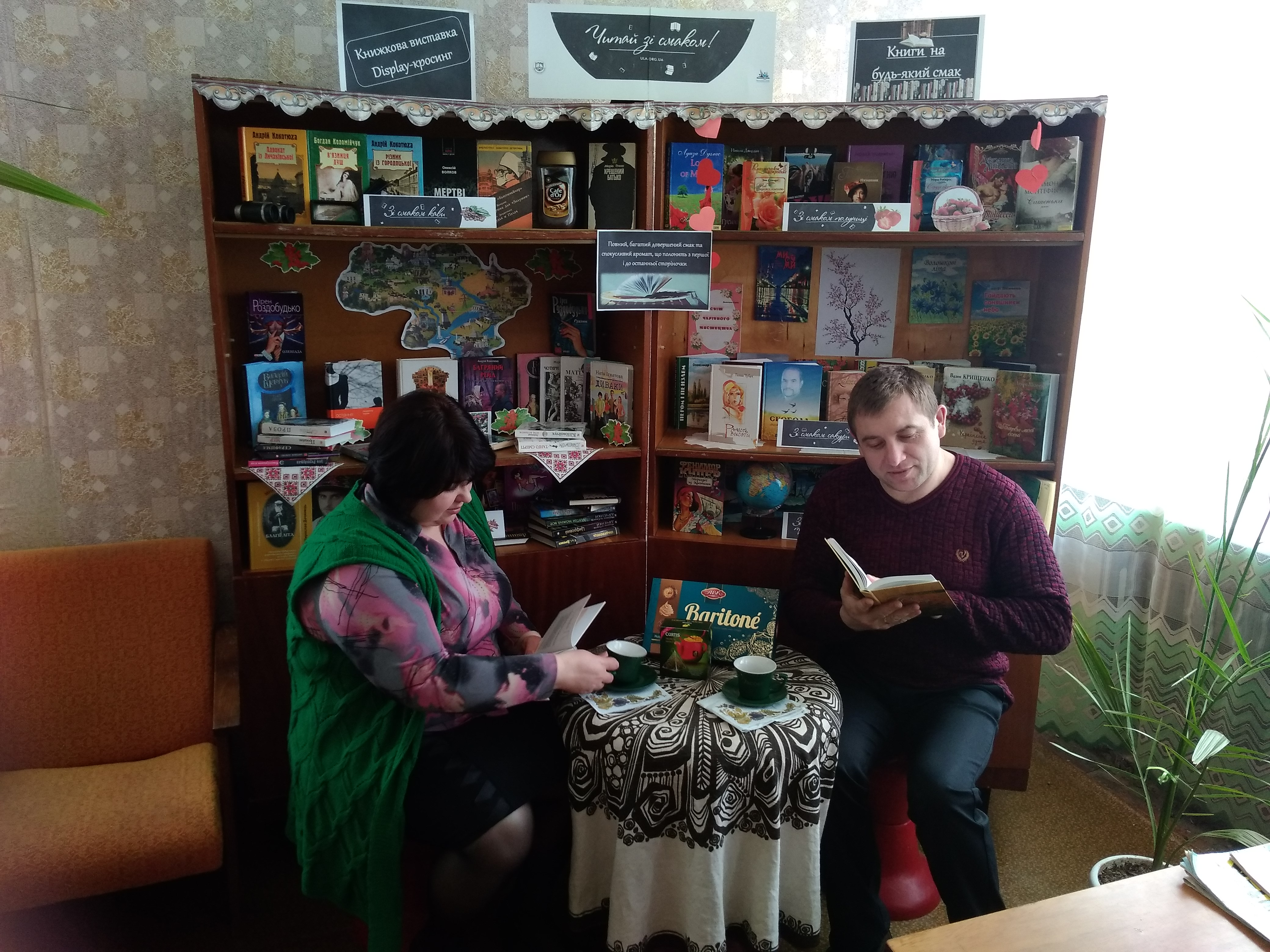 виставка